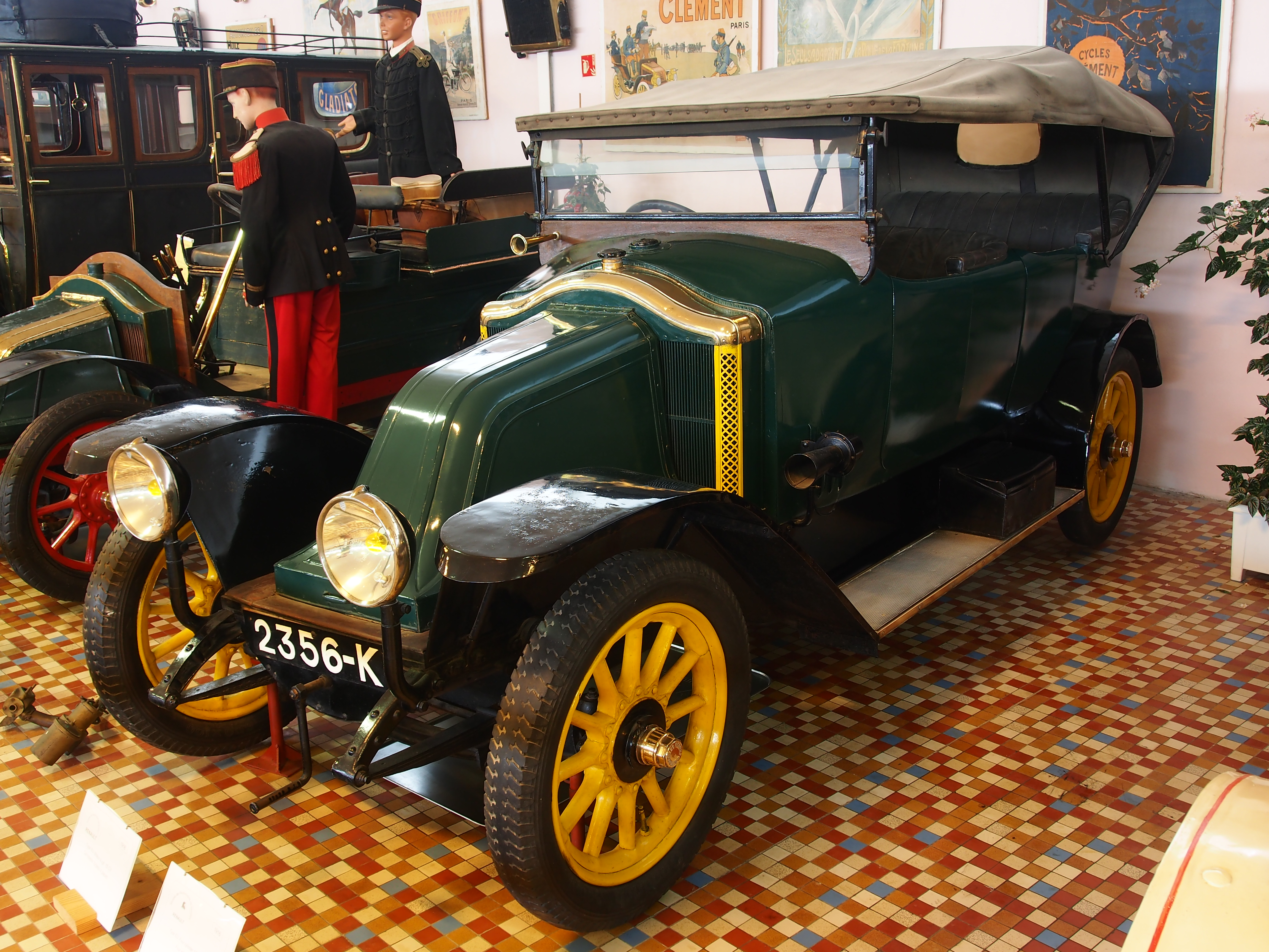 Photographed at the Musée Automobile de Vendée, France.